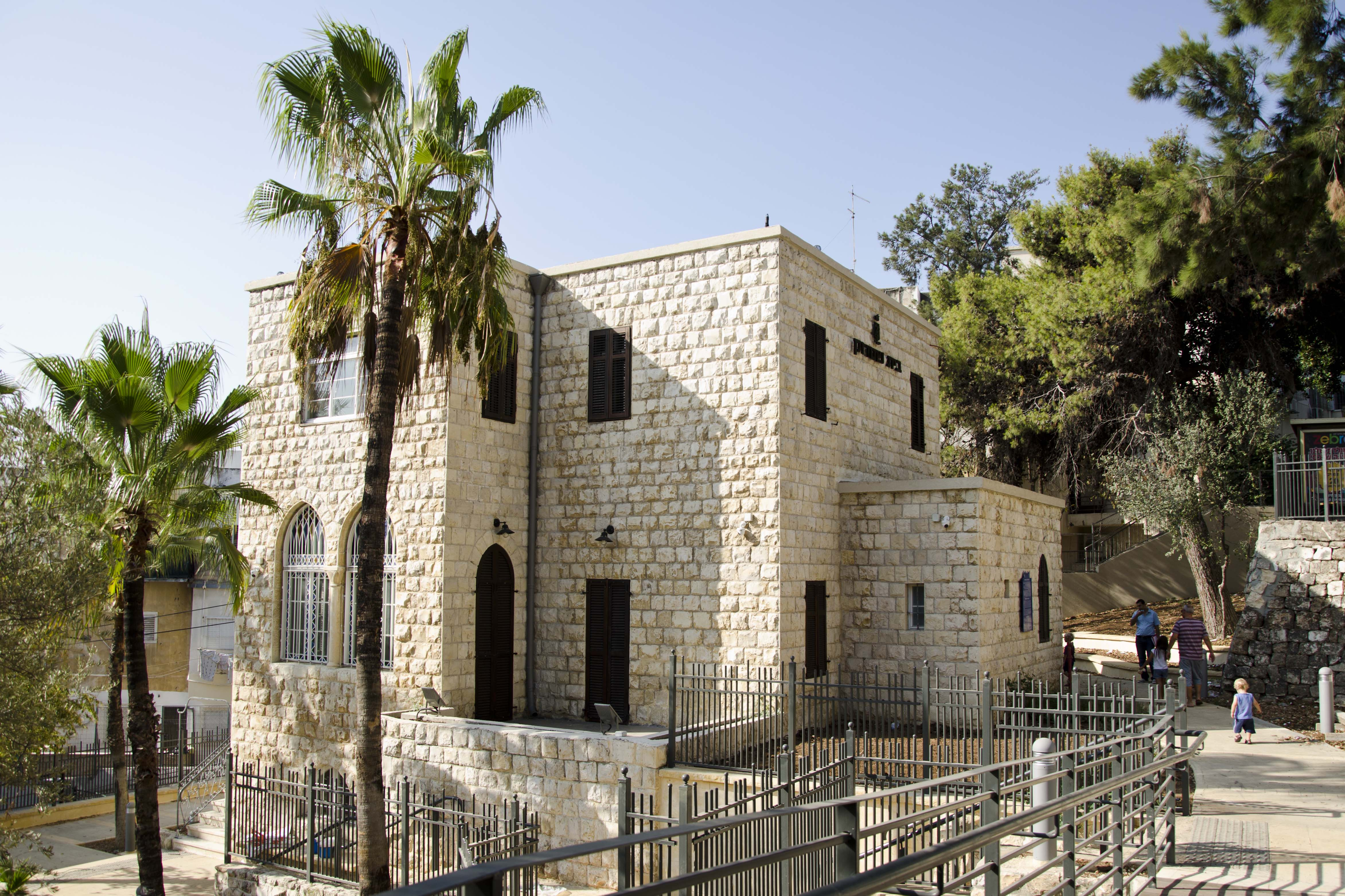 שטרוק